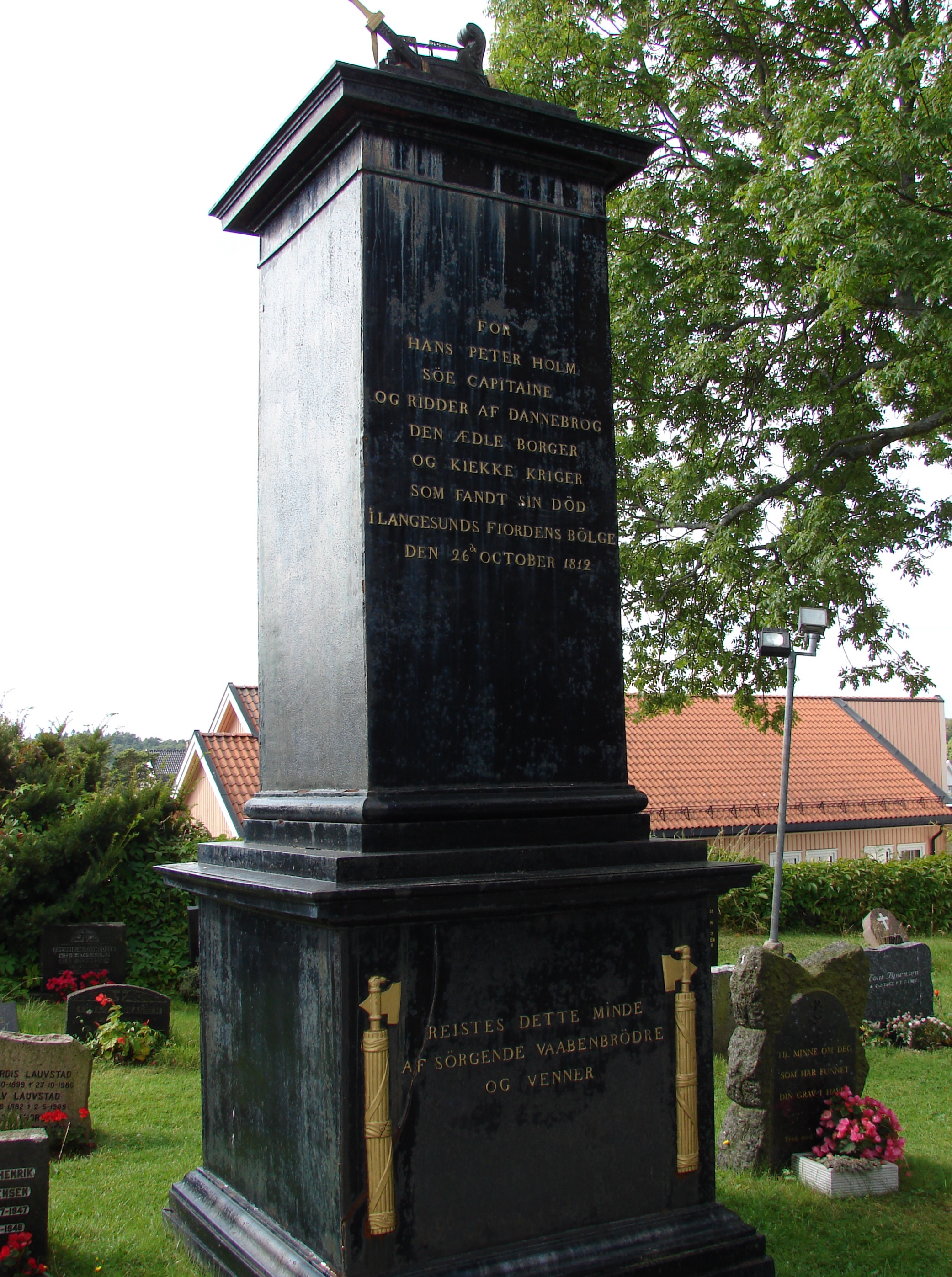 Gravminde fra Langesunds Kirkes kirkegård, Grenland i Telemarken: Gravminde fra Langesund Kirkes kirkegård: FOR HANS PETER HOLM SÖE CAPITAINE OG RIDDER AF DANNEBROG DEN ÆDLE BORGER OG KIEKKE KRIGER SOM FANDT SIN DÖD i LANGESUNDS FIORDENS BÖLGE DEN 26DE OCTOBER 1812. REISTES DETTE MINDE AF SÖRGENDE VAABENBRÖDRE OG VENNER